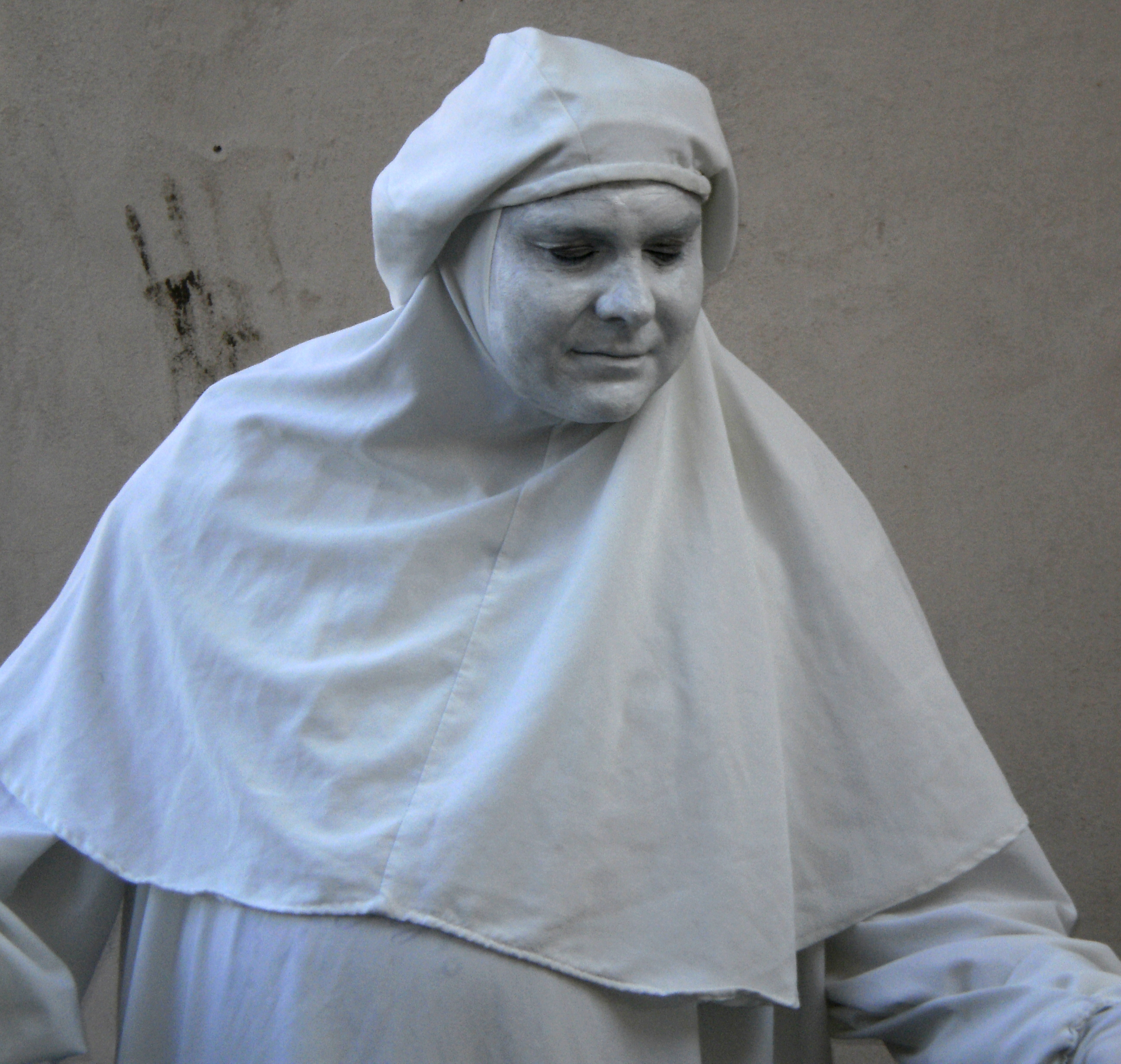 Živá socha (Bardejov, Bardejovský jarmok 2009)